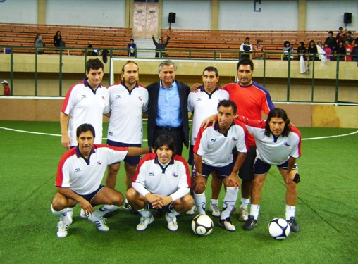 Iván Zamorano y la selección chilena de showgol realizará entrenamiento abierto en Talcahuano.